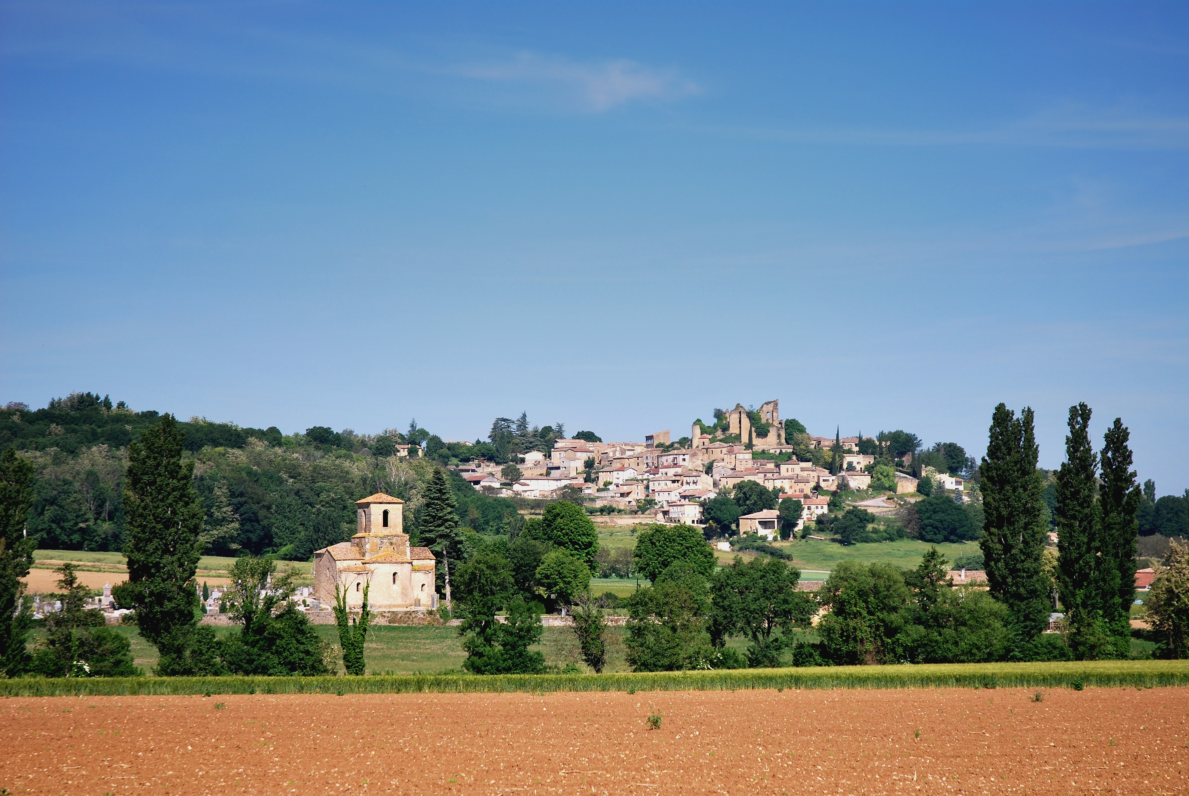 Chabrillan